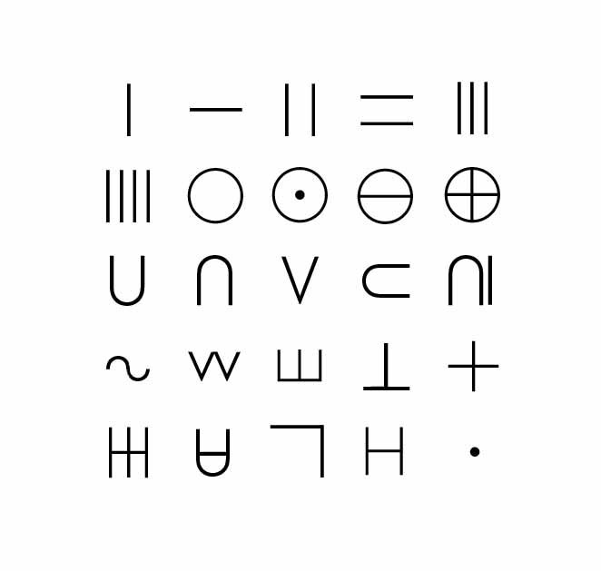 Zeichenbestand libysch-berberischen Inschriften auf der Insel El Hierro (ohne Varianten), nach Renata Ana Springer Bunk Die libysch-berberischen Inschriften der Kanarischen Inseln in ihrem Felsbildkontext, Köln, 2014, S. 62